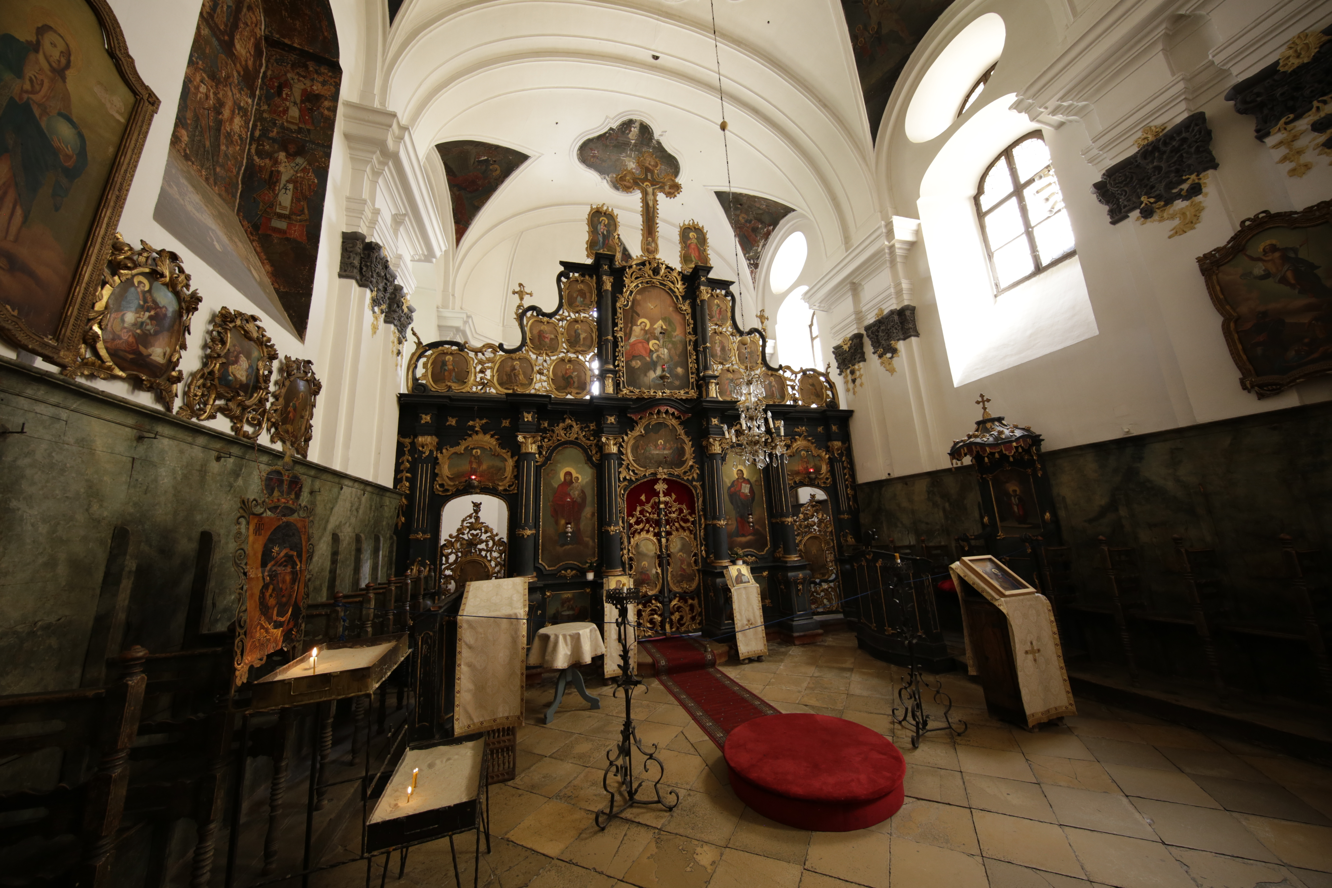 Szentendrei Blagovesztenszka szerb görögkeleti templom (szerbül: Благовештенска црква) Pest megyében, Szentendrén.